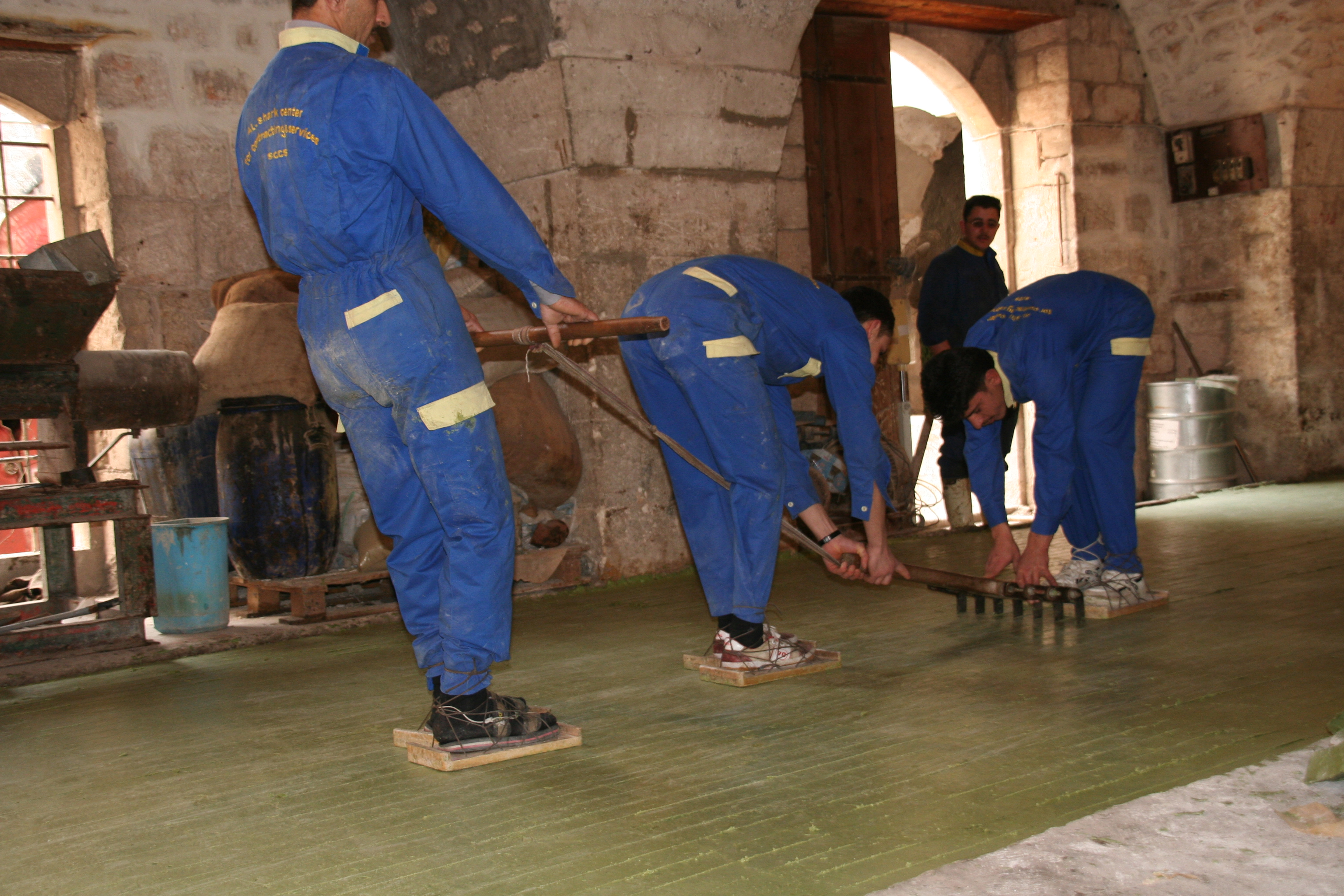 Trois ouvriers de la savonnerie Al-Jebeili à Alep tranchent le savon